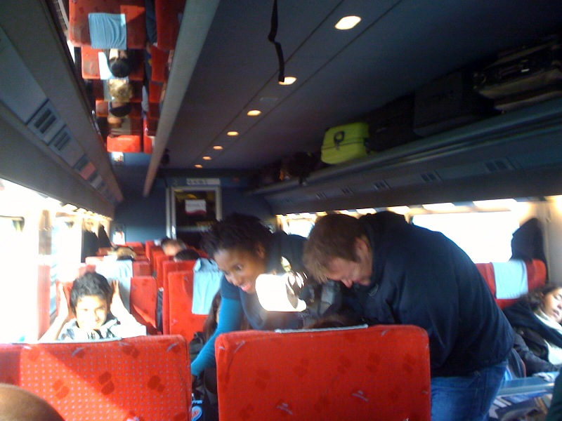 Het Jeugdjournaal interviewt kinderen in de Thalys over het nieuwe spoor, vlak voor noodstop. Milouska Meulens. 13 december 2009